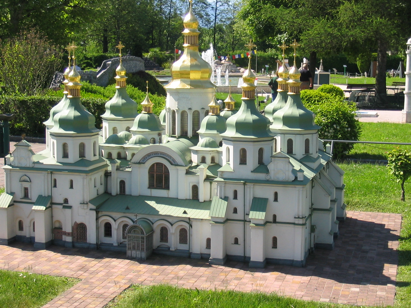 Sophienkathedrale at Minimundus (Klagenfurt)